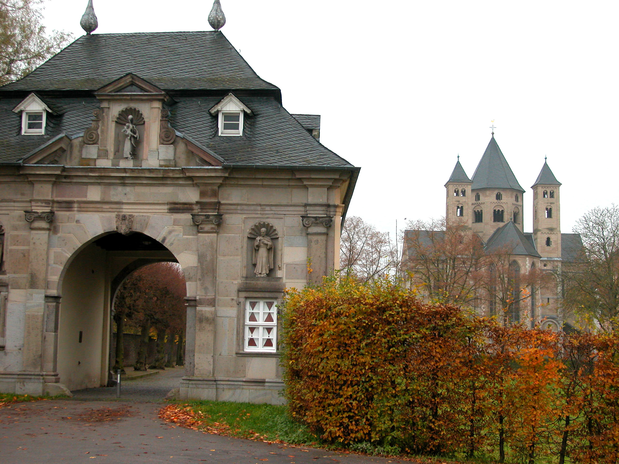 Kloster Knechtsteden bei Dormagen, NRW, Deutschland